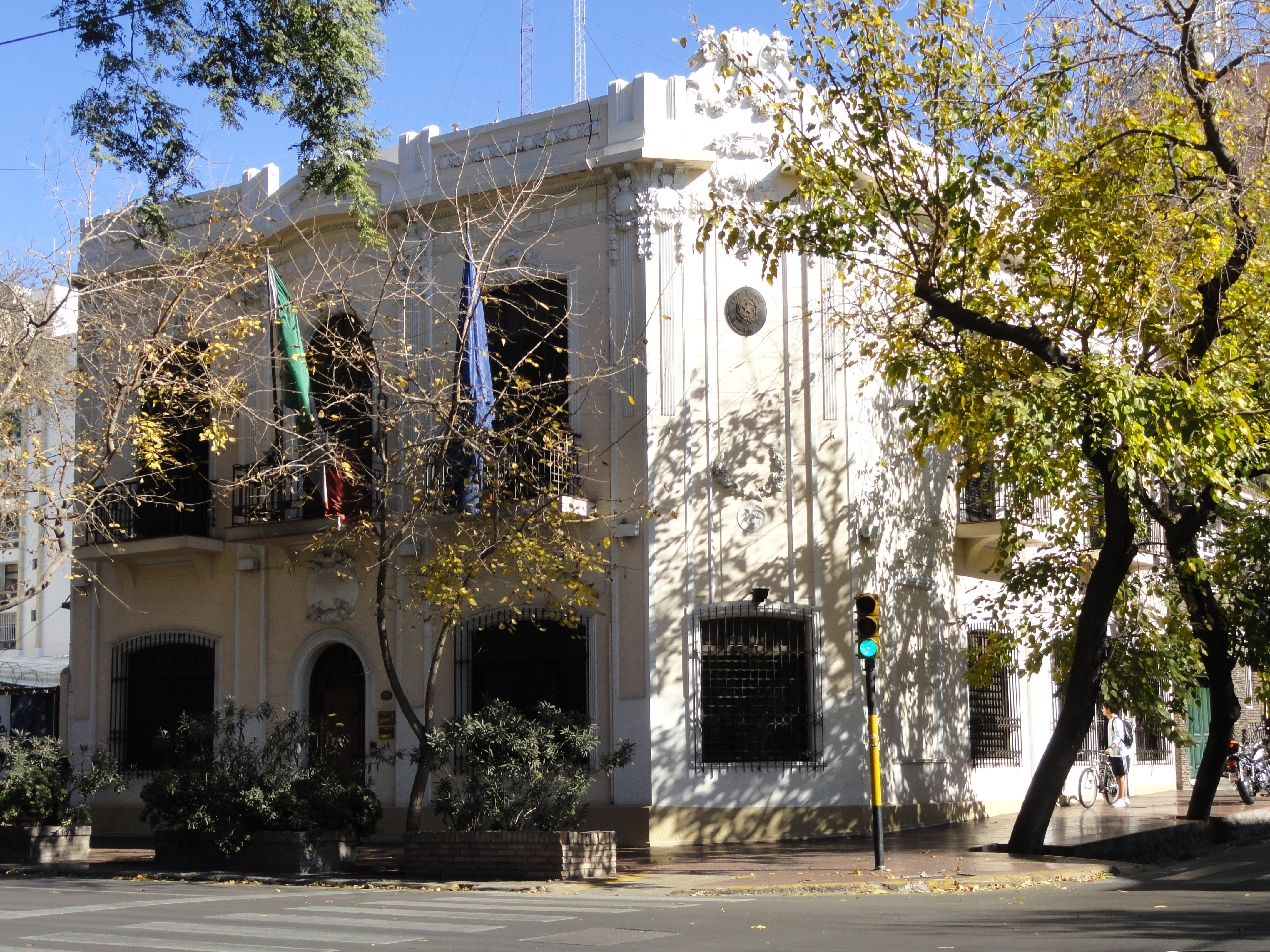 Consulado de Italia en ciudad de Mendoza, calles Perú esq. Necochea